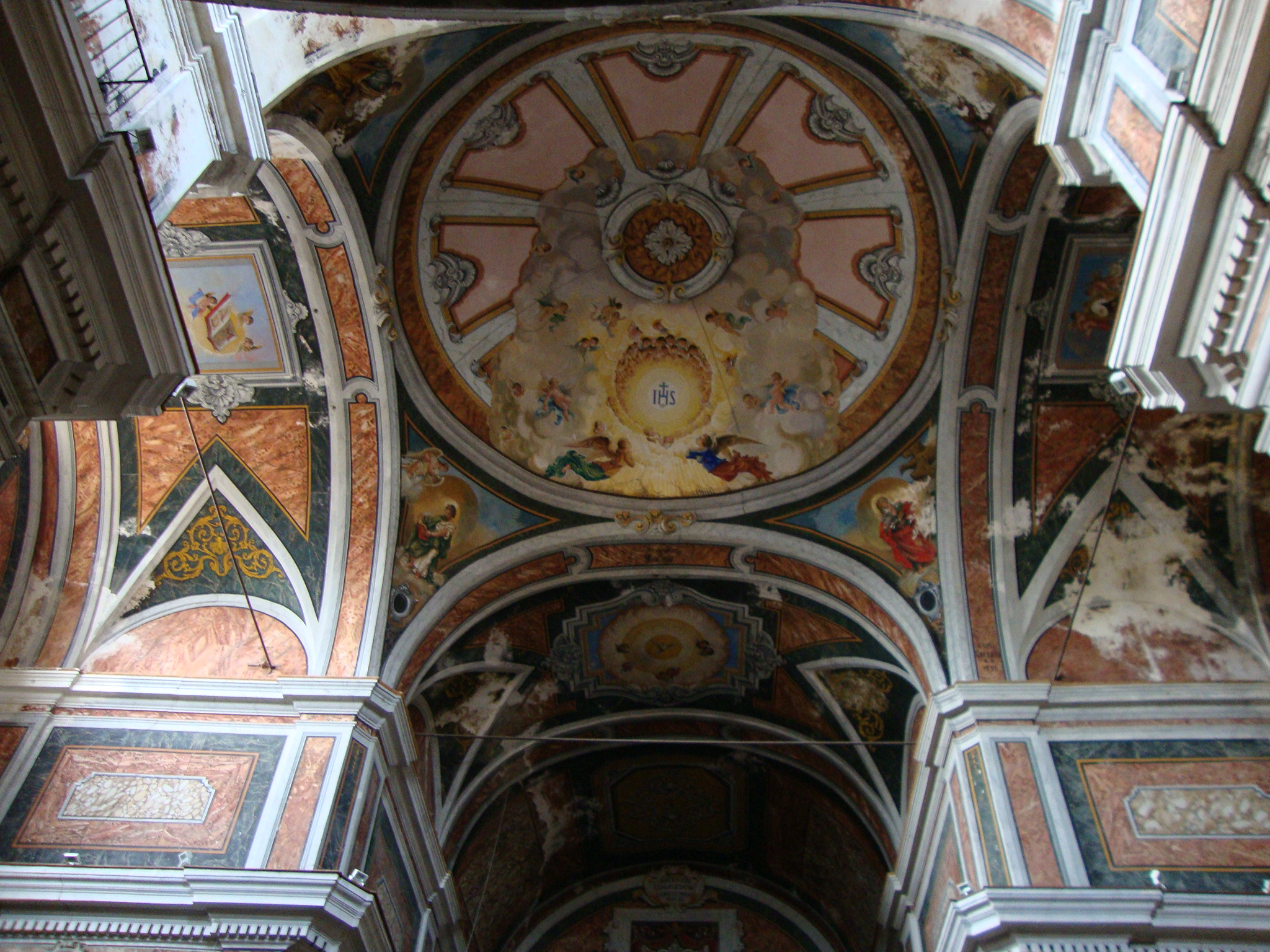 Interno della chiesa di Sant' Agata di Caltanissetta; particolare del soffitto. Autore: Insider93